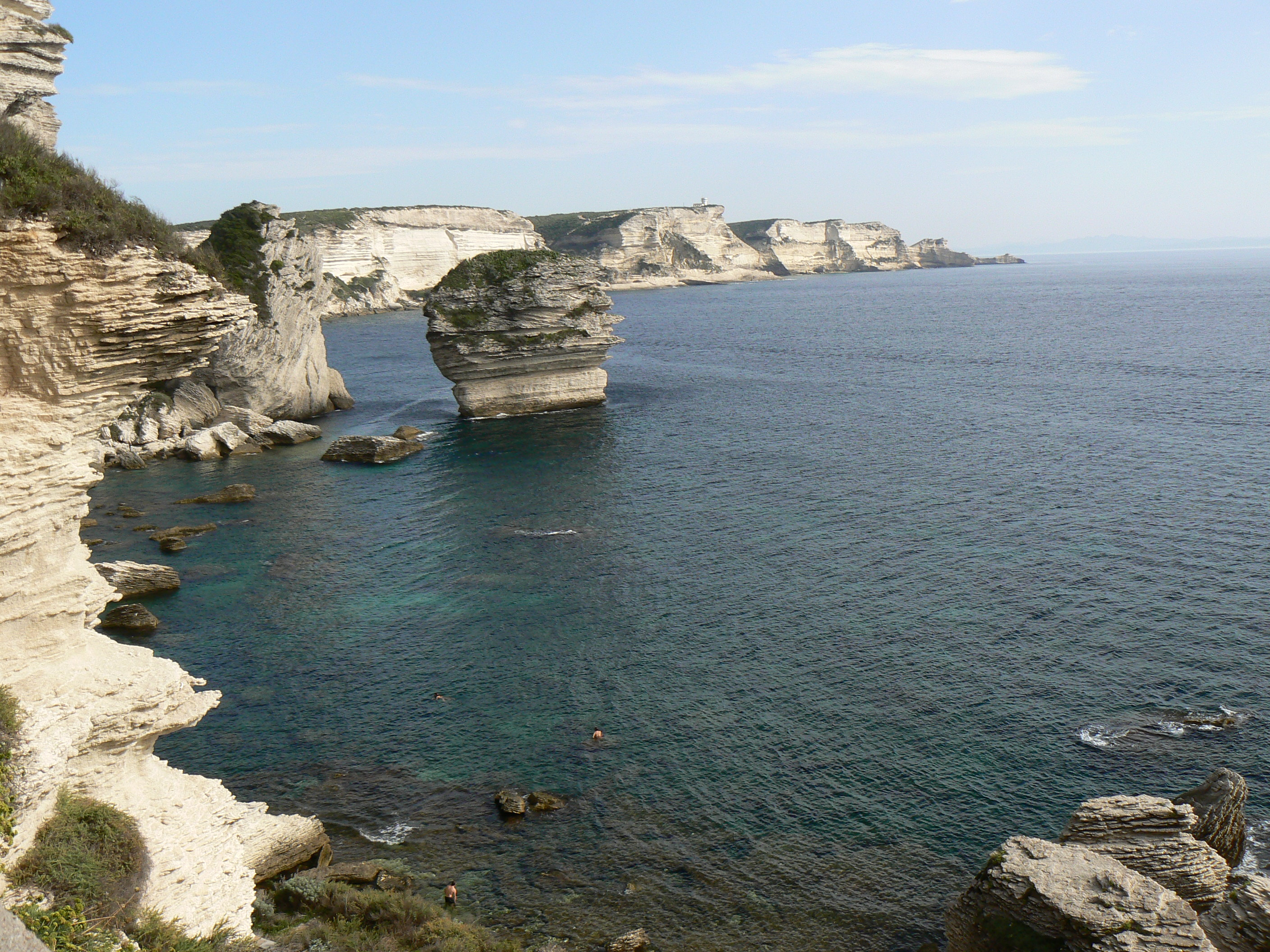 morskarezervaceuBonifacia